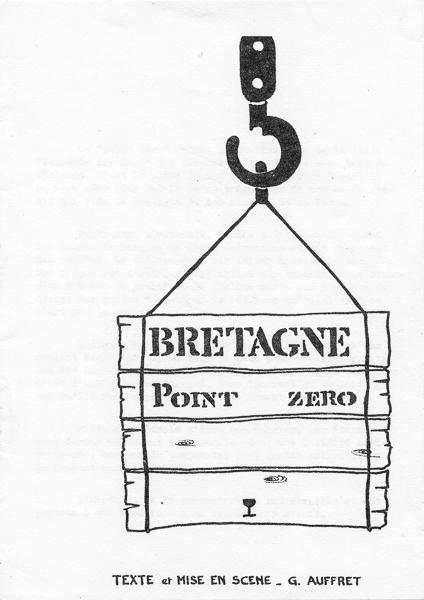 Affiche de la pièce de théâtre Breatgne... point zéro